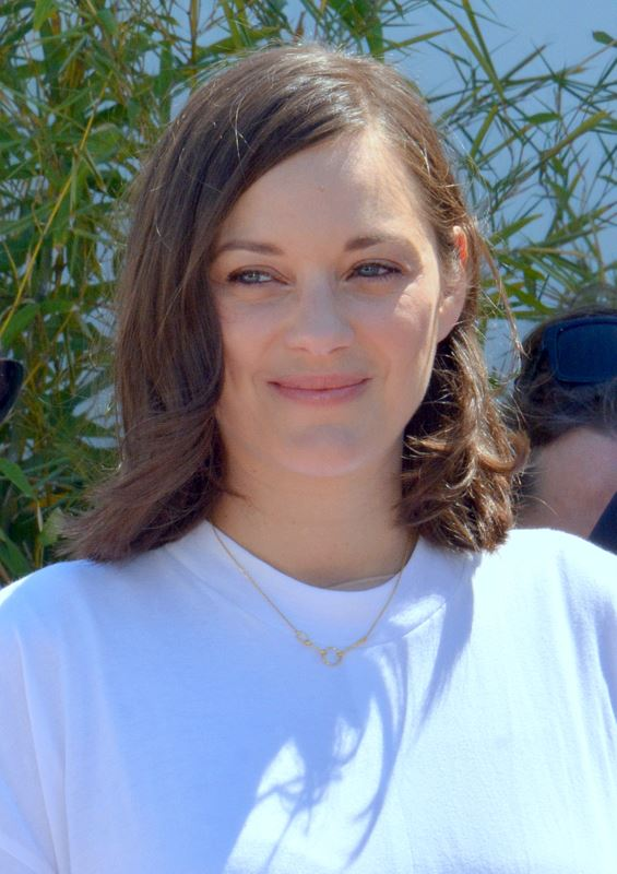 Marion Cotillard au festival de Cannes